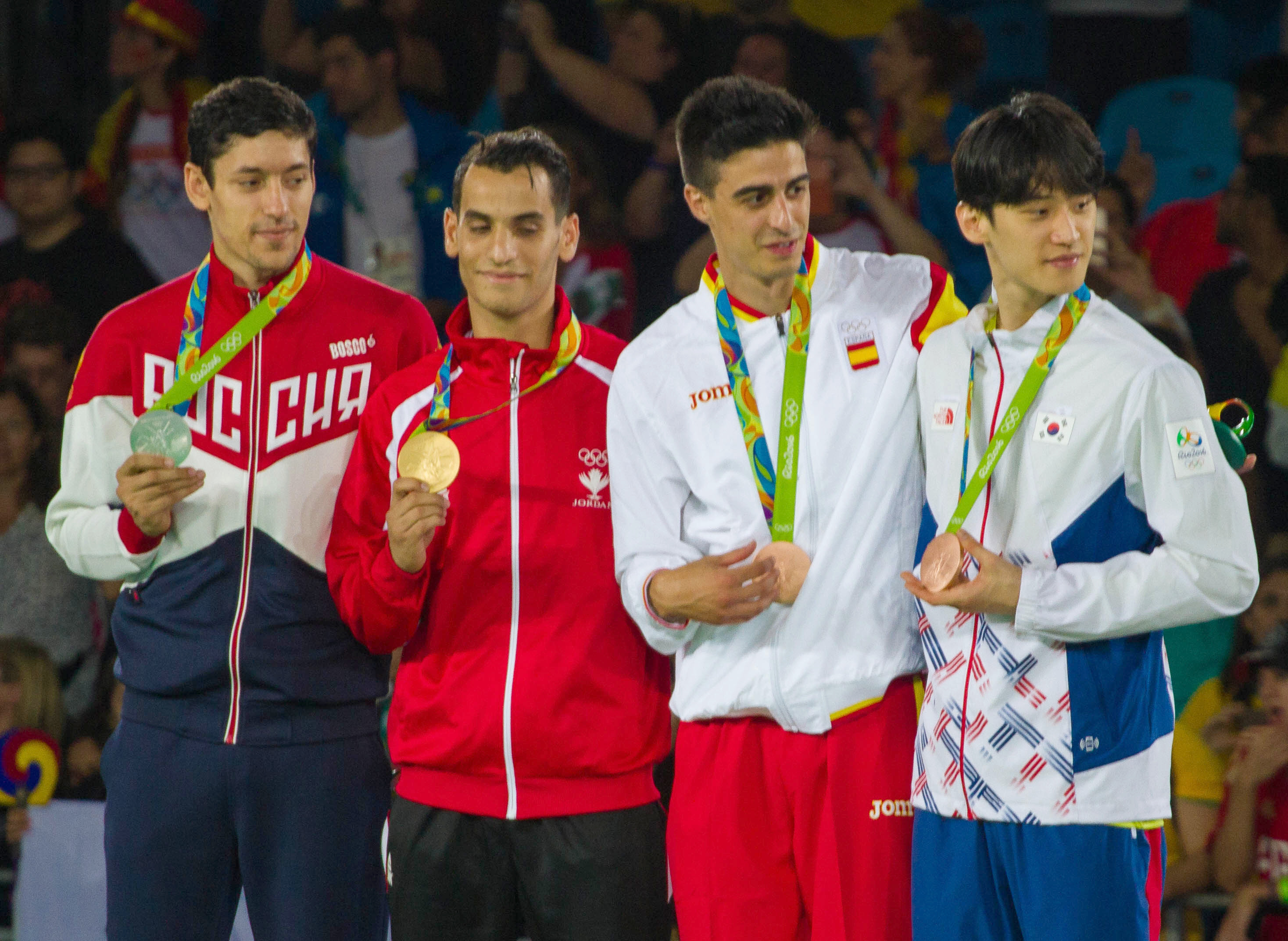 Rio 2016